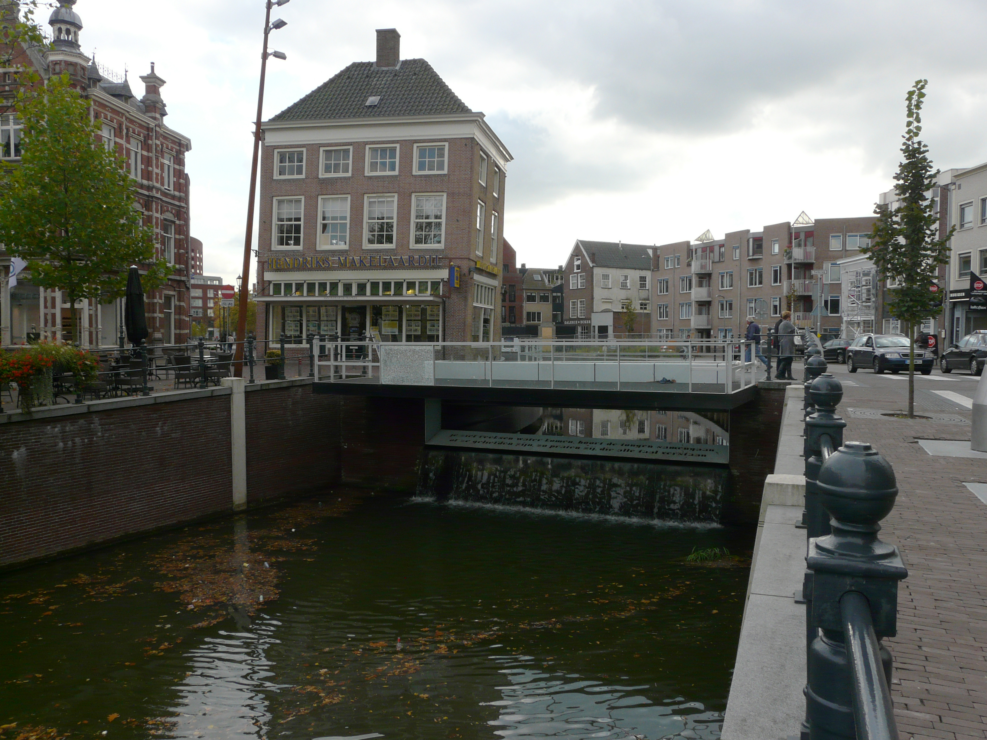 Zicht op een deel van de Tolbrug, Breda. Gelegen tussen de Tolbrugstraat, Breda en de Haagdijk. Ook nog zicht op deel van de Markendaalseweg. Nabij de haven van Breda en het centrum van Breda